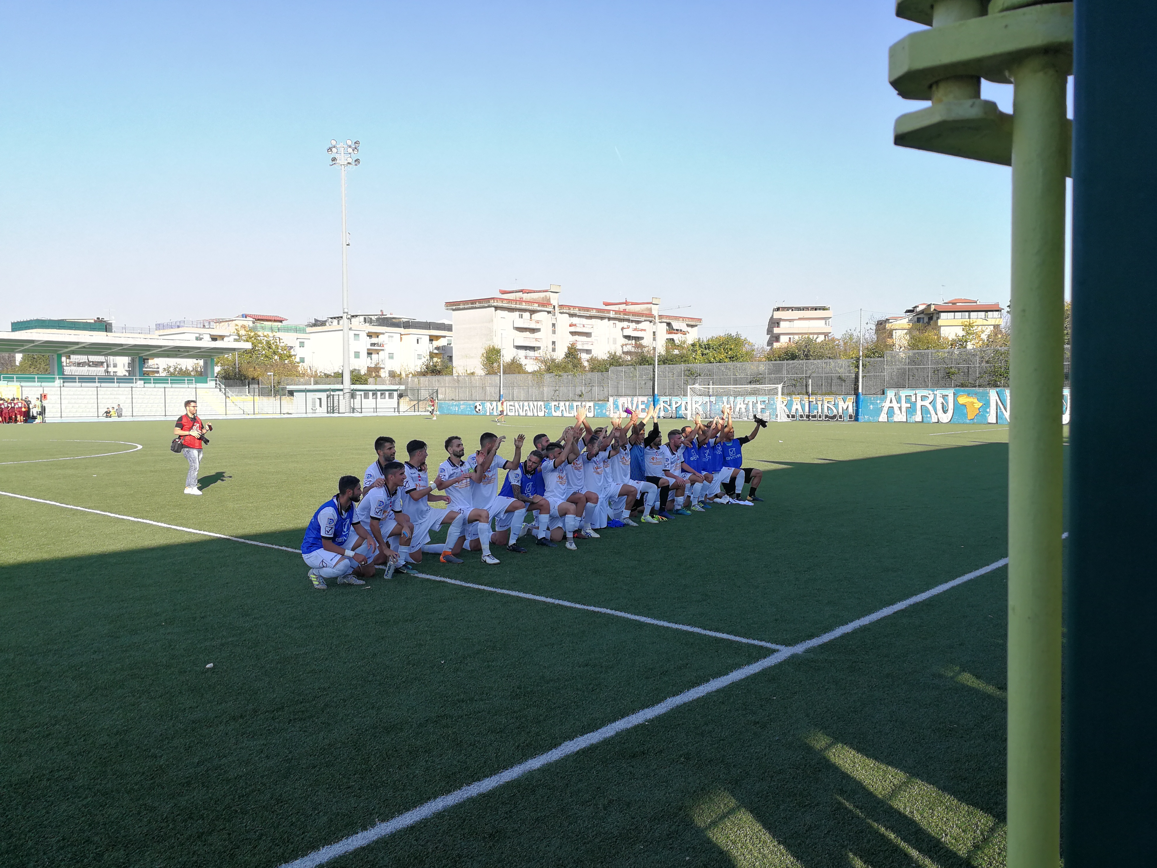 La squadra del Savoia al termine della partita contro il Pomigliano